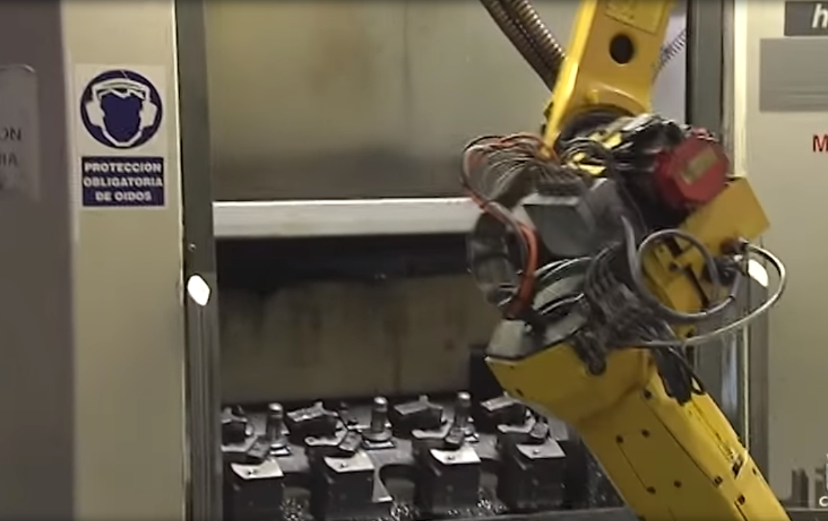 Pilar del Olmo visita la fábrica de Edscha en Burgos por su 50º aniversario.